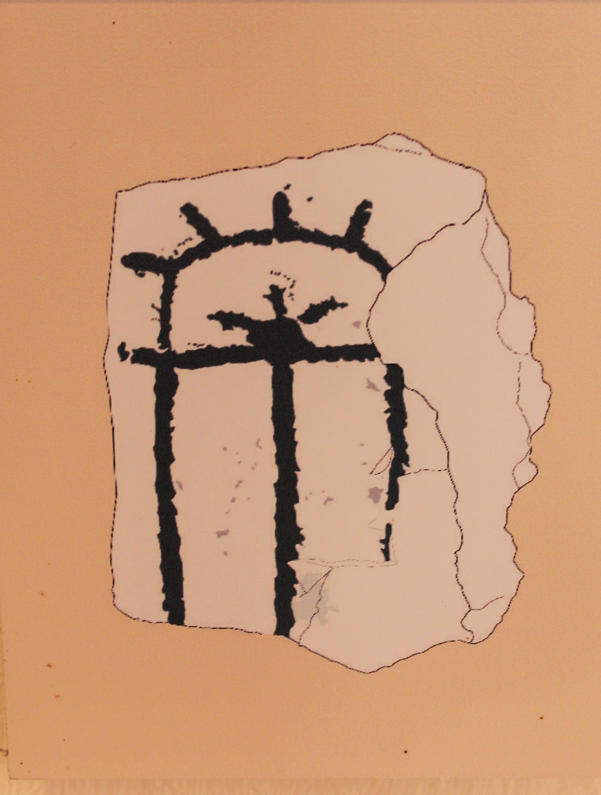 Esquema estela de guerrero. Siglo VII-VI a.C Los Llanos, Zarza Capilla, Badajoz